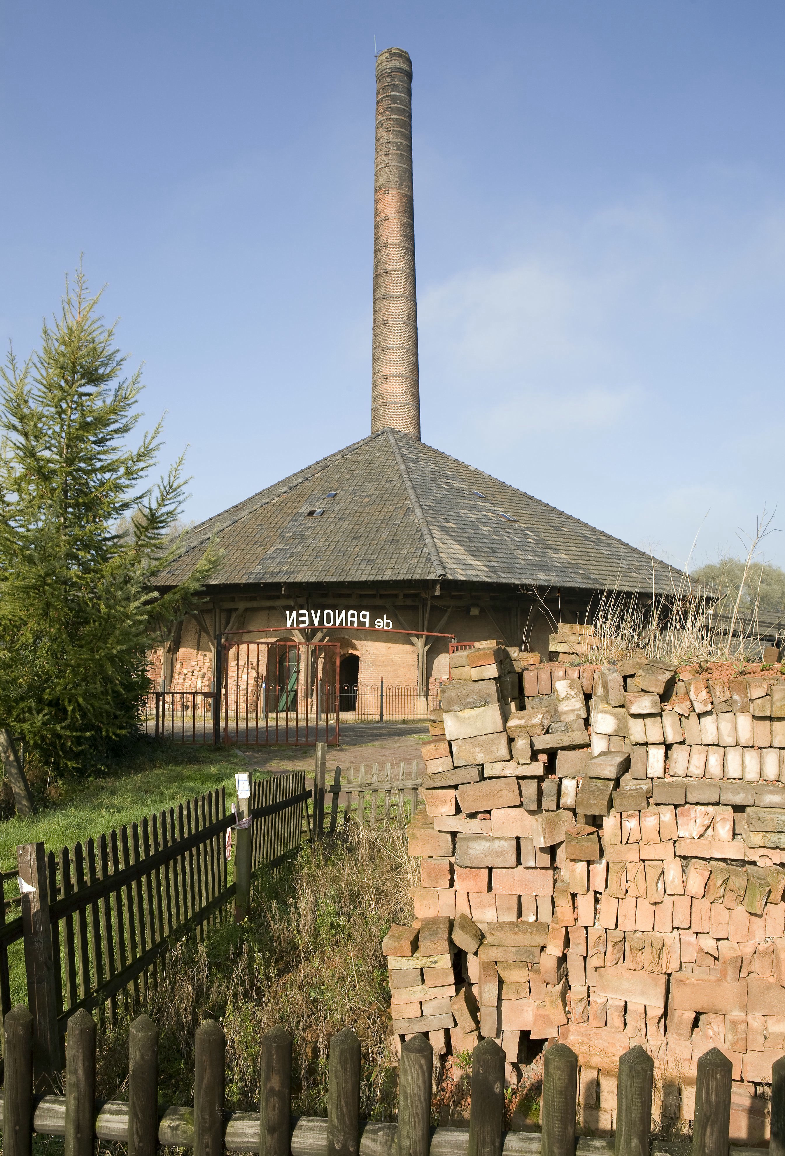 Voormalige pannenfabriek, thans Baksteenmuseum De Panoven: Overzicht van de panoven met op de voorgrond stenen (opmerking: Gefotografeerd voor portfolie nieuwbouw)